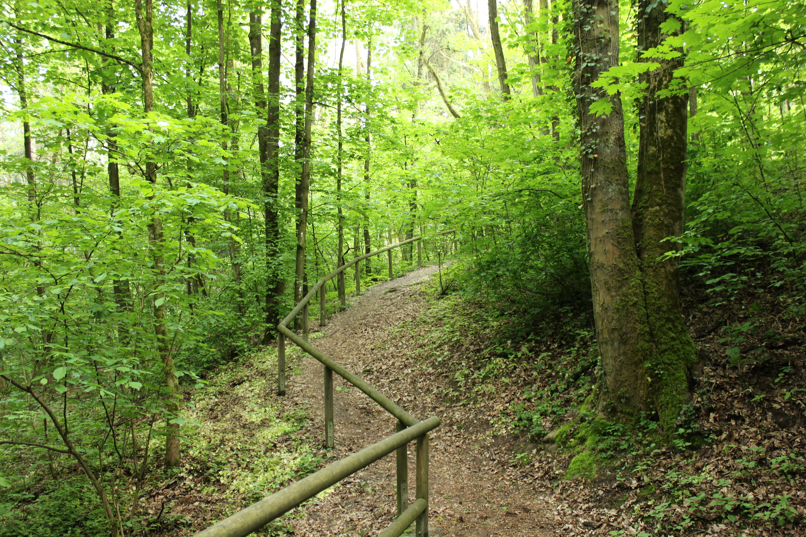 Der Sportübungsplatz der Bundeswehr am Bogenberg-Nordhang gehört zur Liste der FFH-Gebiete im Landkreis Straubing-Bogen mit der Nummer 7042-371.